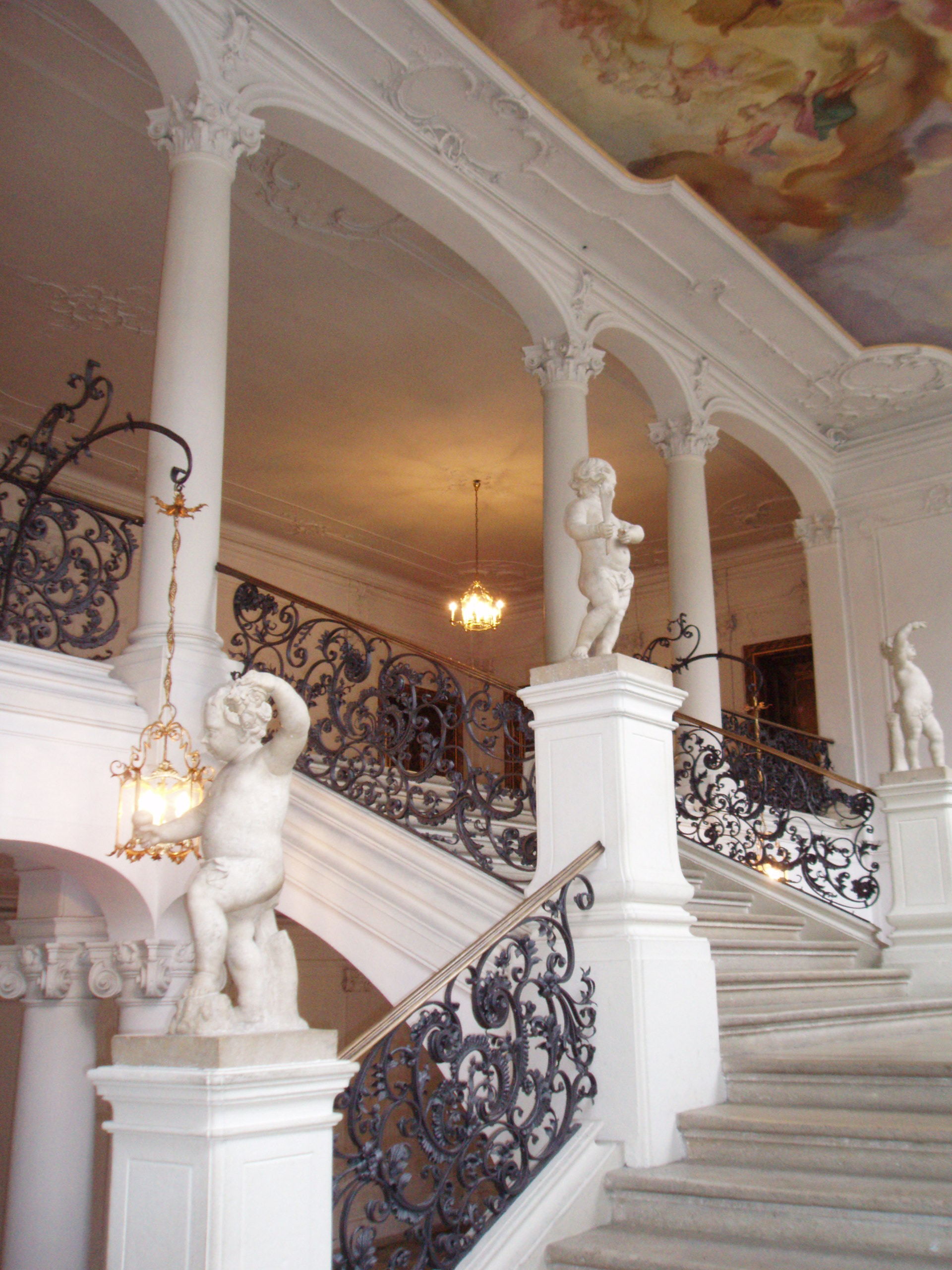 Treppenhaus in der ehemaligen fürstbischöflichen Residenz Eichstätt, heute Landratsamt